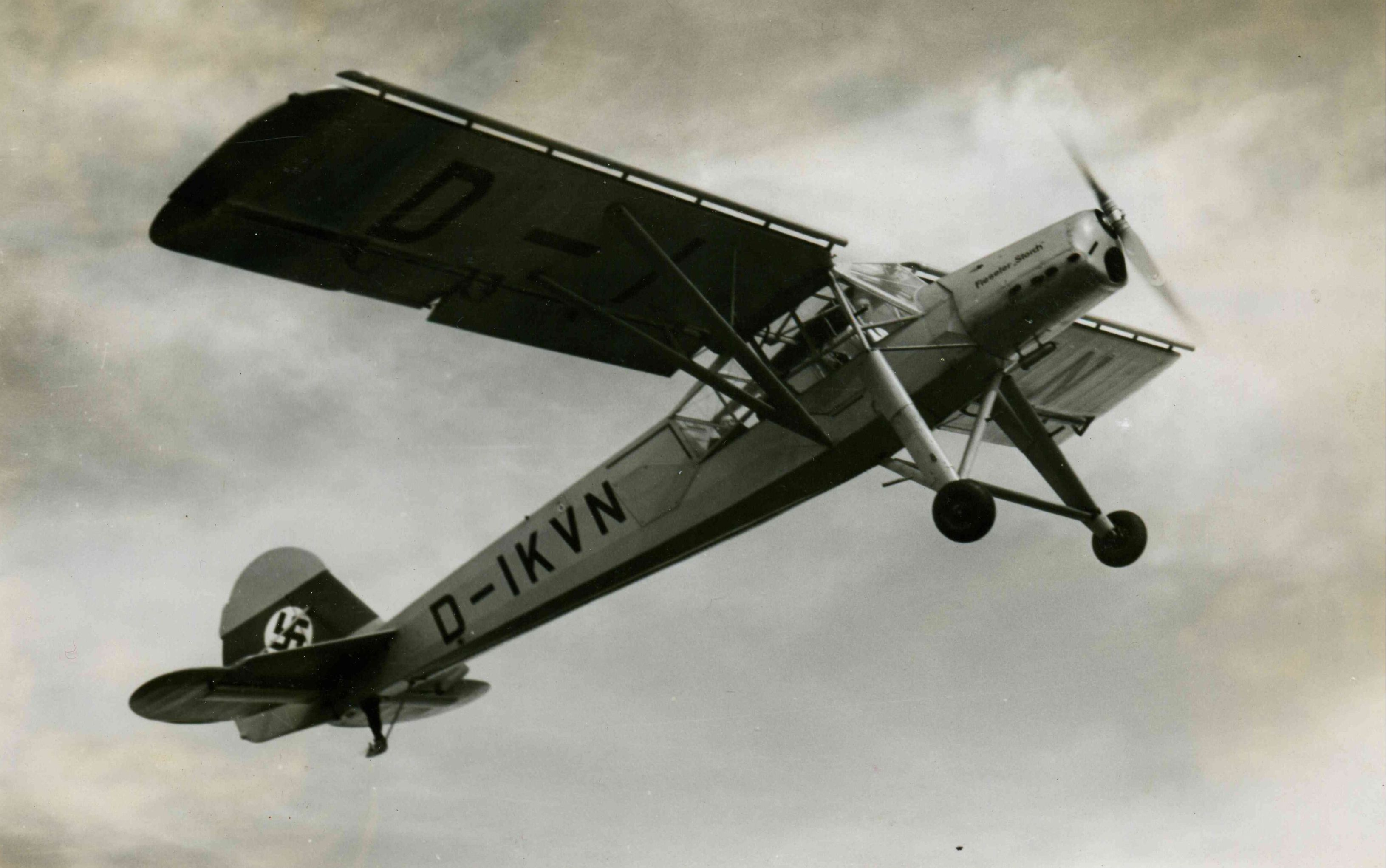 Foto der Fieseler Fi 156 "Storch". Dieses Flugzeug mit dem Kennzeichen D-IKVN war die Vorführmaschine des Unternehmens. Entwickelt und gebaut bei dem Fieseler Flugzeugbau Kassel.